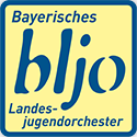 Logo des Bayerischen Landesjugendorchesters.